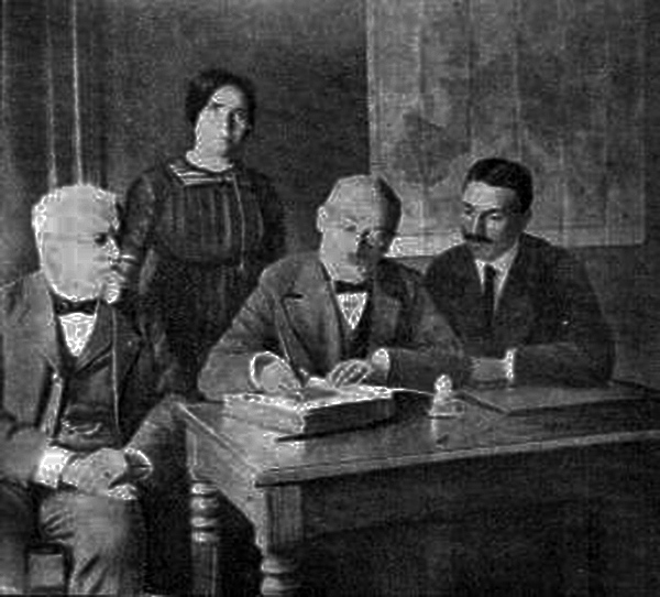 Foto pri la vizito de LLZ en la Esperantista Centra Oficejo en Parizo, la 15-an de aŭgusto 1913. Zamenhof venis al Parizo por ĉeesti la enterigon de Carlo Bourlet. Tiam ankaŭ li vizitis la Esperantistan Centran Oficejon kaj enskribis sian nomon sur la Oran Libron. De maldekstre: Hippolyte Sebert, Eugénie Ferter-Cense, L. L. Zamenhof, Gabriel Chavet.